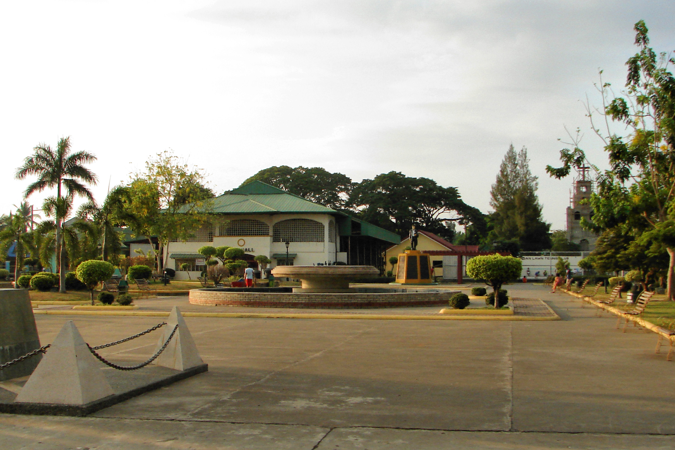 Mapandan, Pangasinan, Philippines